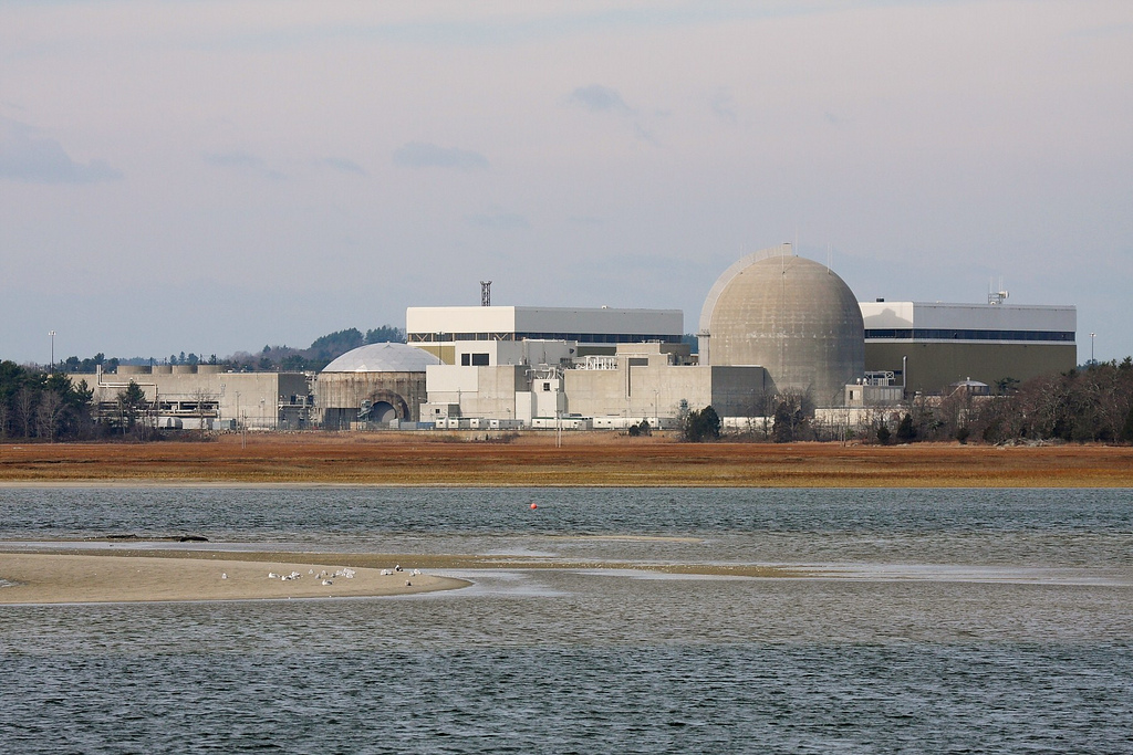 IMG_1561a